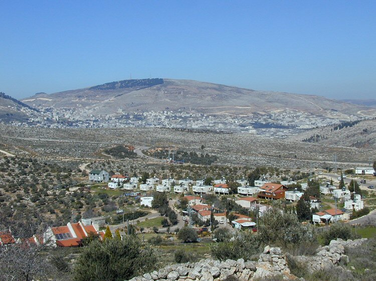 איתמר